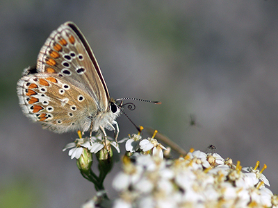 Aricia montensis